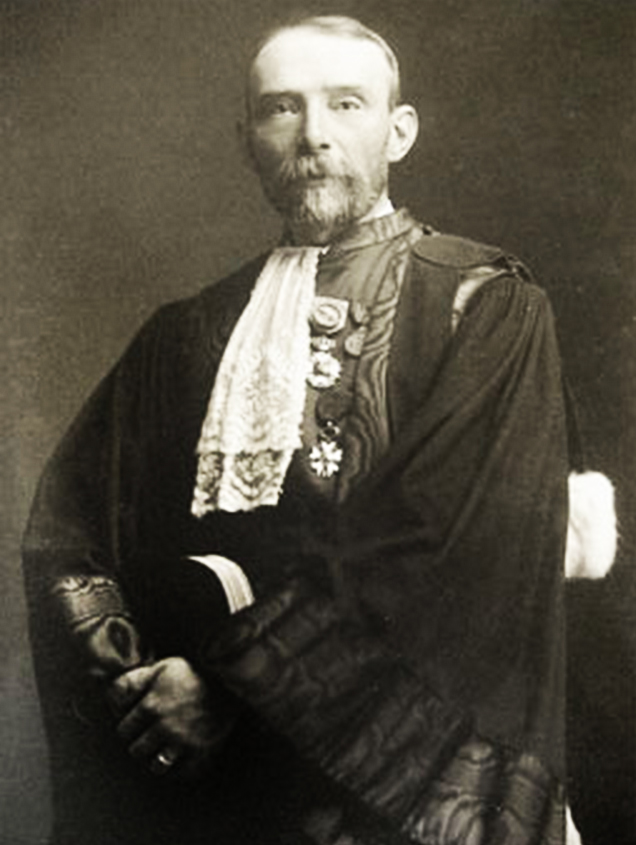 Magistrat belge, ministre d'Etat en 1926